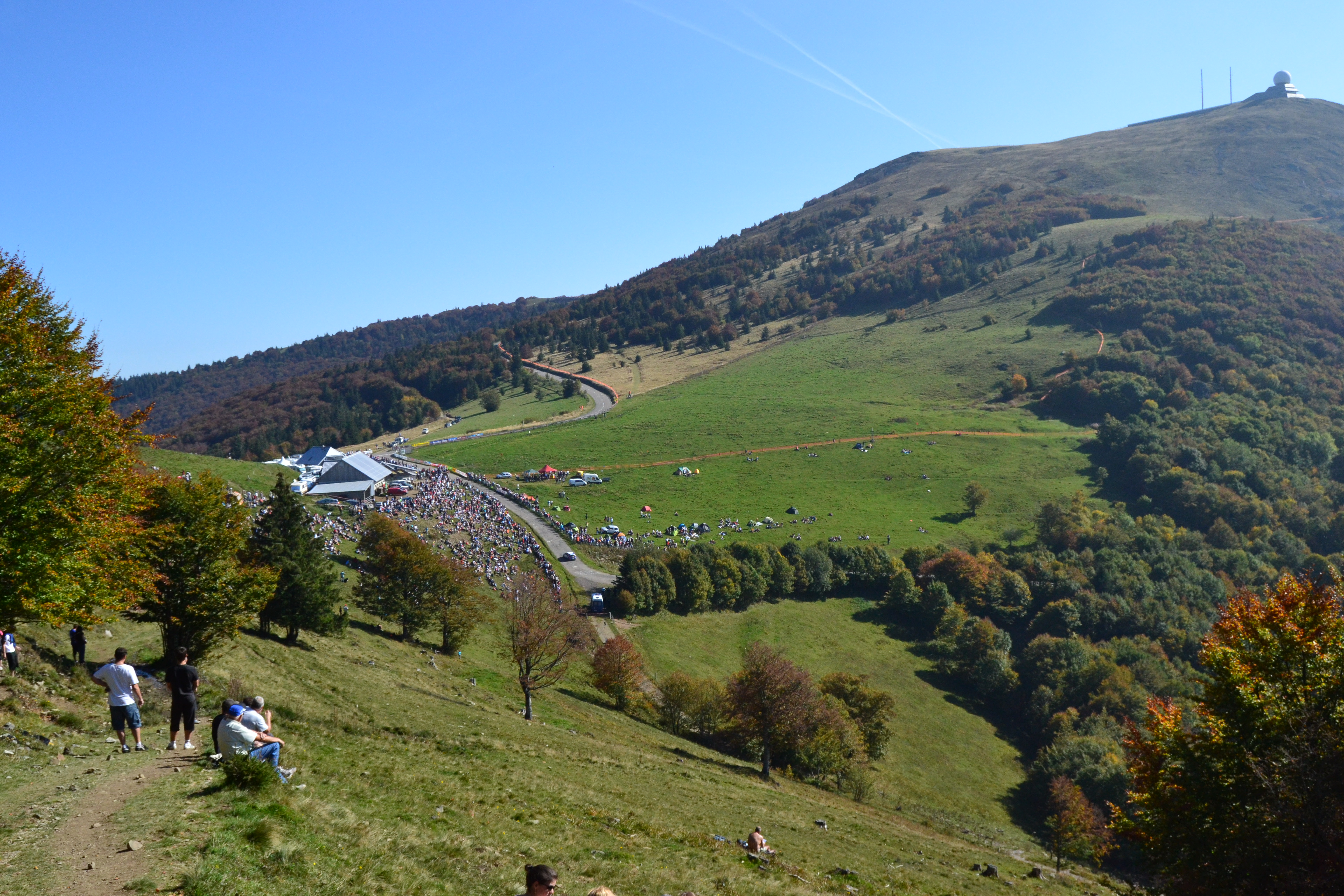 Rallye de France 2011, ES12 Grand Ballon